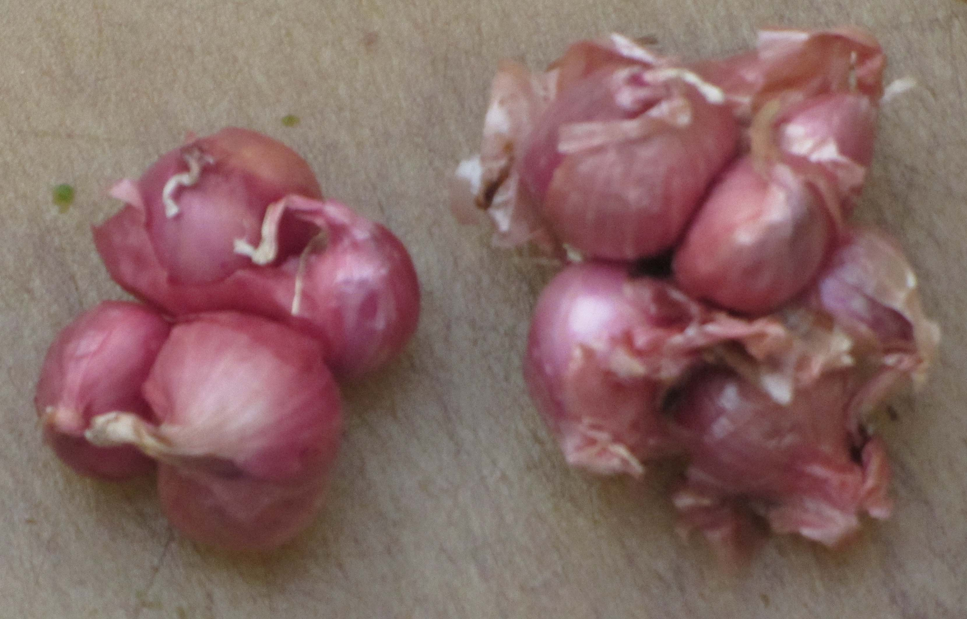 சாம்பார் வெங்காயம். அரியும்போது கண் எரியும். நிலத்தடிப் பயிர்.